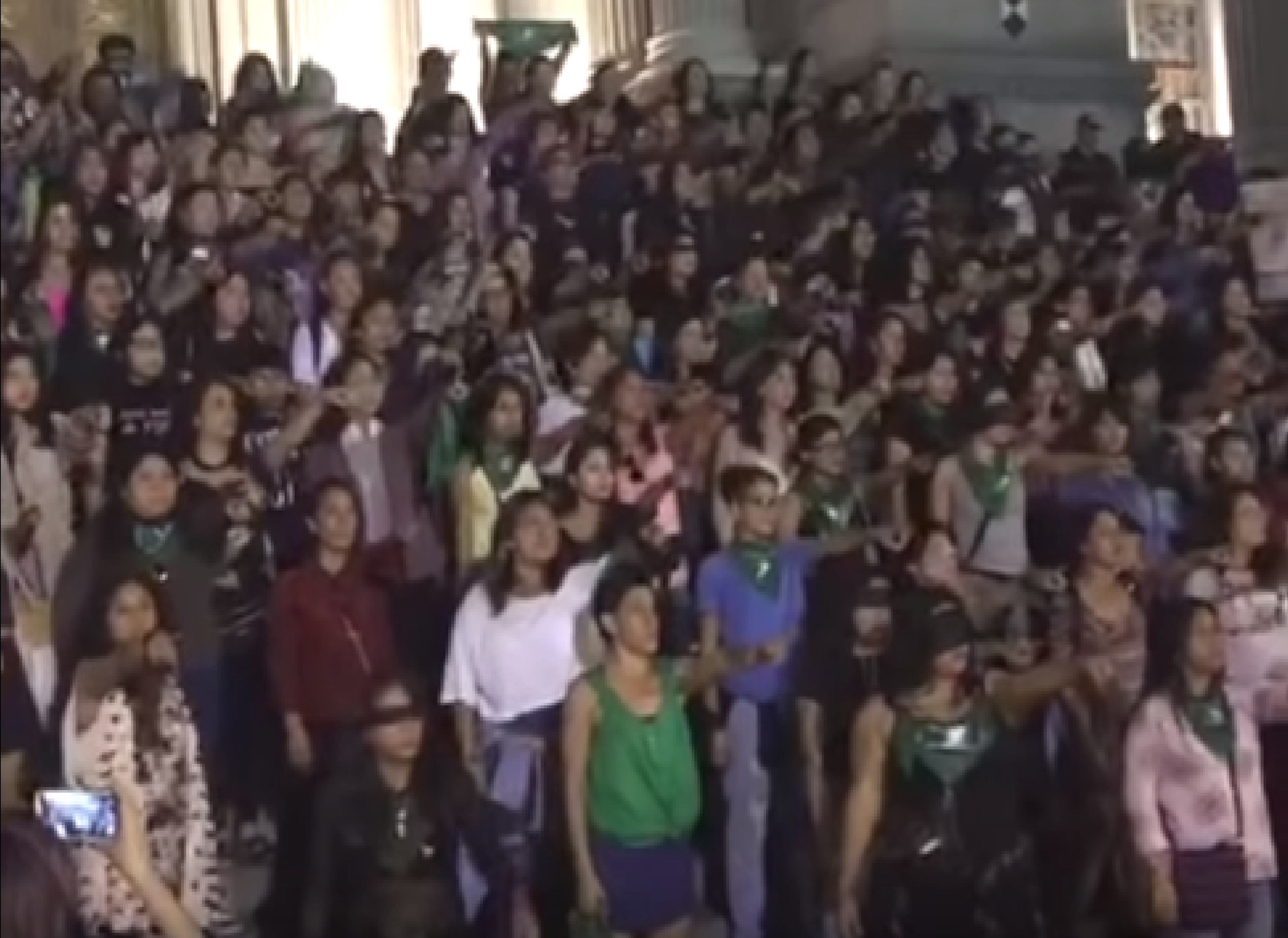 Perú: "El violador eres tú"